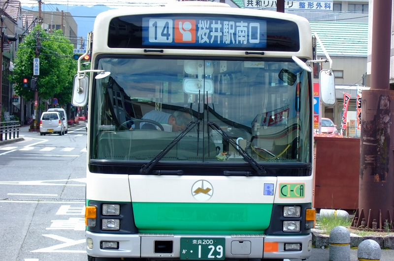 2000年式エルガミオ中型バス。幕式時代（この後LED改造）、榛原営業所所属。桜井駅南口バス停へ。この後折返し談山神社行に。2010年4月より桜井市コミュニティバス